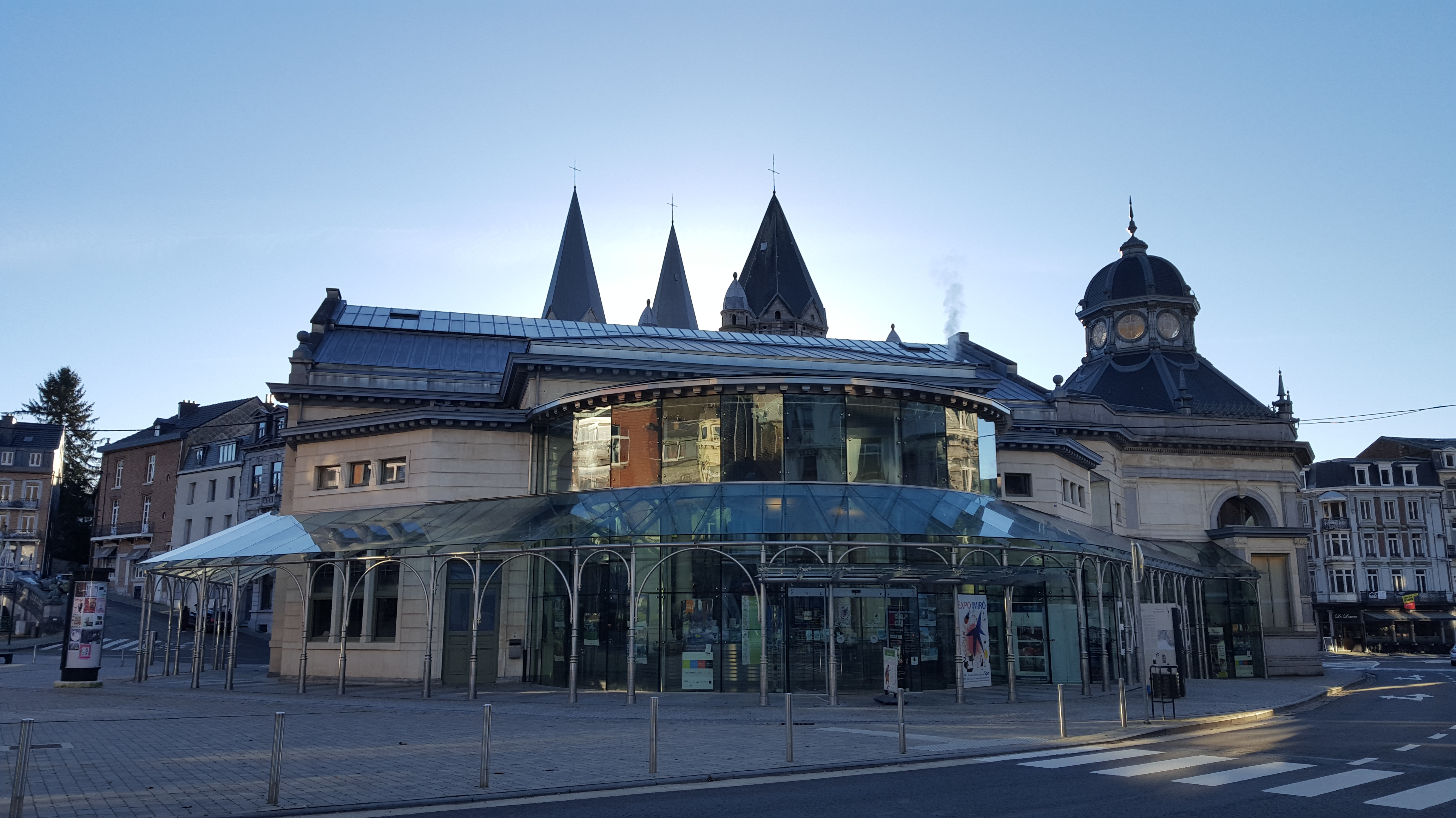 Pouhon Pierre-le-Grand, Spa, Belgique